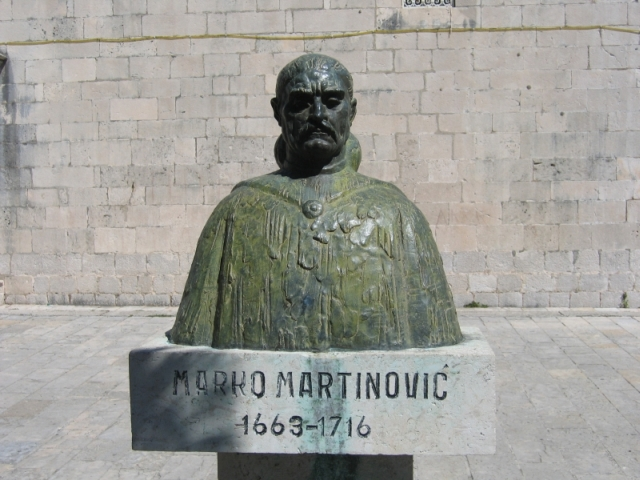 Фотография бюста, перед собором города Пераст (Черногория).